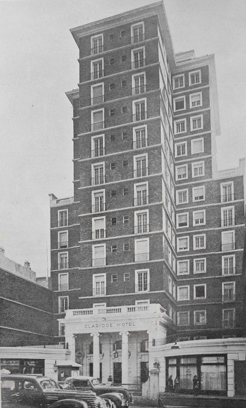 Vista de la fachada del Claridge Hotel, obra del arquitecto Arturo Dubourg. Inaugurado en Buenos Aires en agosto de 1946. Calle Tucumán 535. Barrio de San Nicolás.